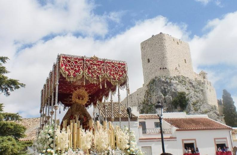 Virgen de los Dolores perteneciente a la cofradía de Jesús Nazareno, Olvera.